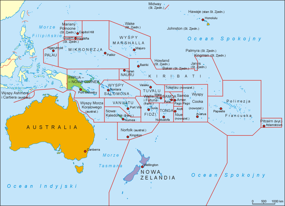 Mapa polityczna Oceanii. Autor: Aotearoa